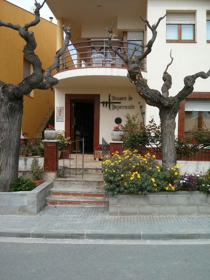 Museo del Esperanto en Sant Pau d'Ordal